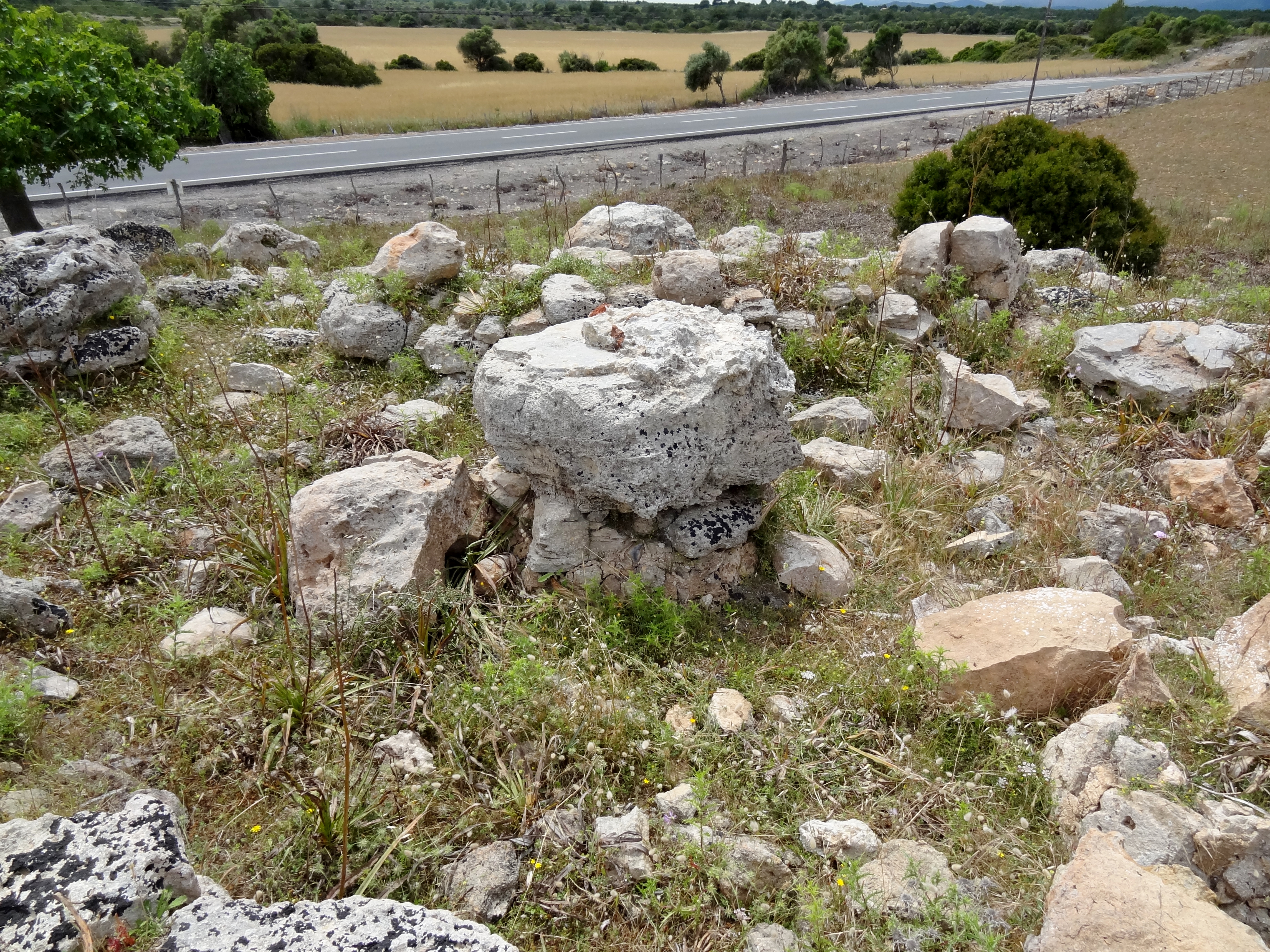 Es Figueral de Son Real, Gemeinde Santa Margalida, Mallorca, Spanien